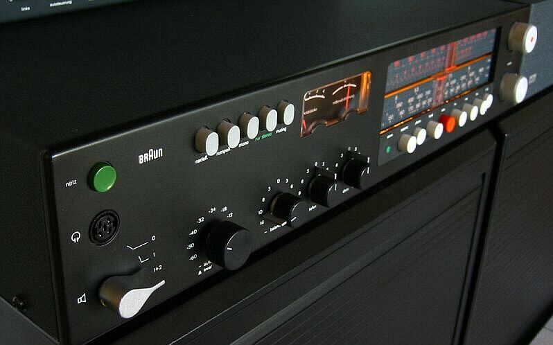 Steuergerät (Receiver) Braun regie 510 von 1972, Design: Dieter Rams